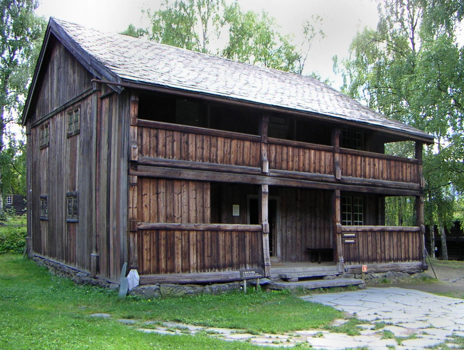 Rognebygningen at Valdres Folkemuseum